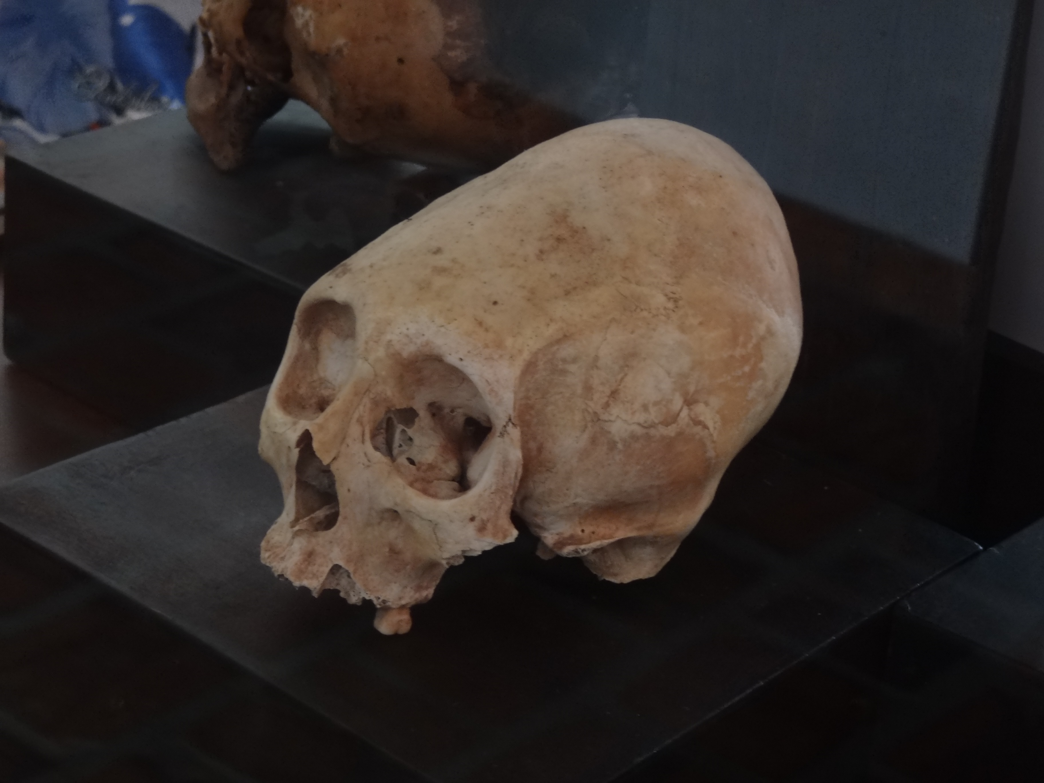 Craneo de un individuo Guane con deformación intencional anular, exhibido en el Parque Nacional del Chicamocha